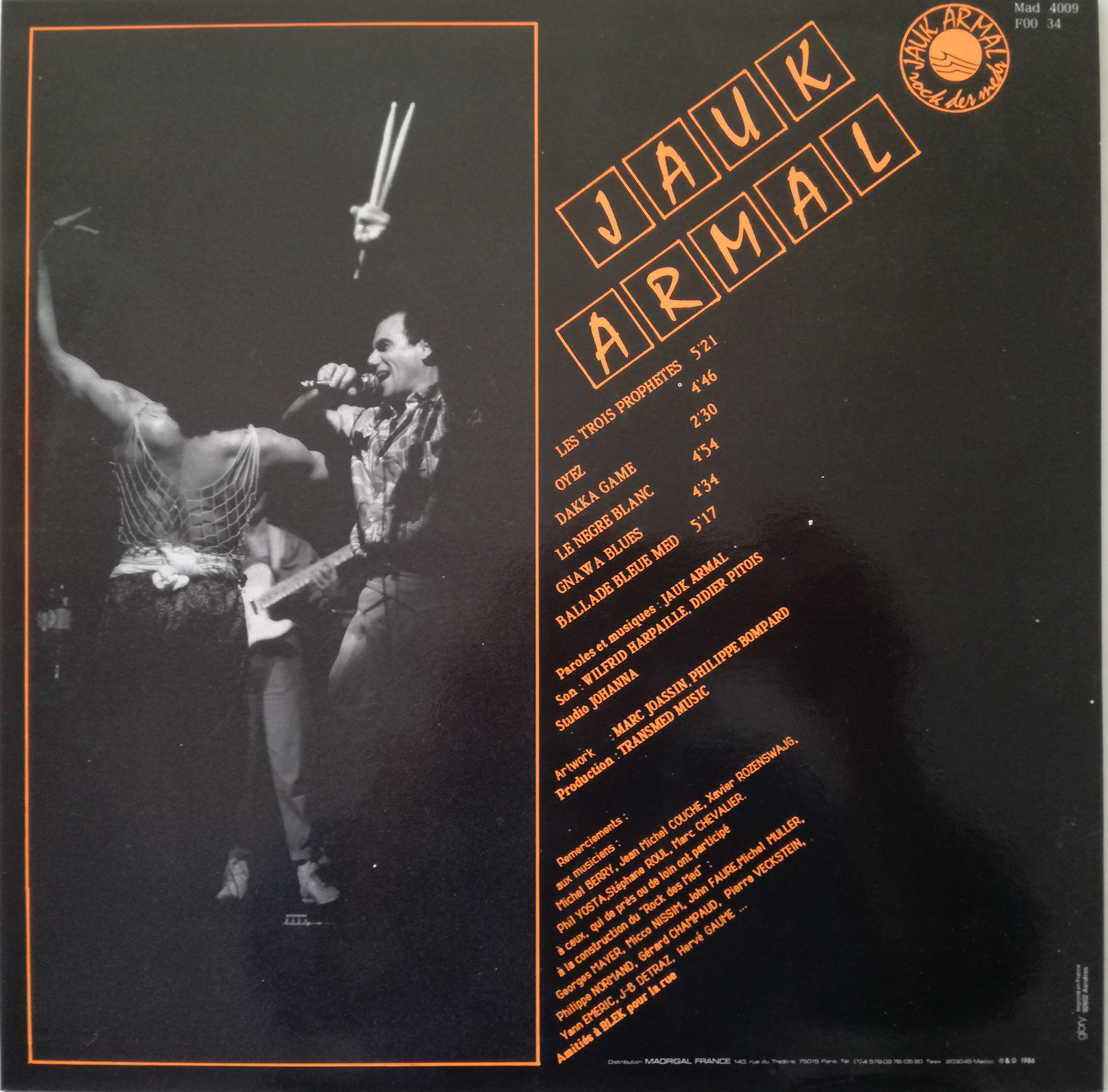 Paroles et musiques Jauk, rock des med